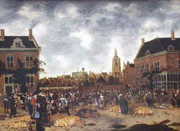 Varkenmarkt in Den Haag, schilderij in Brediusmuseum